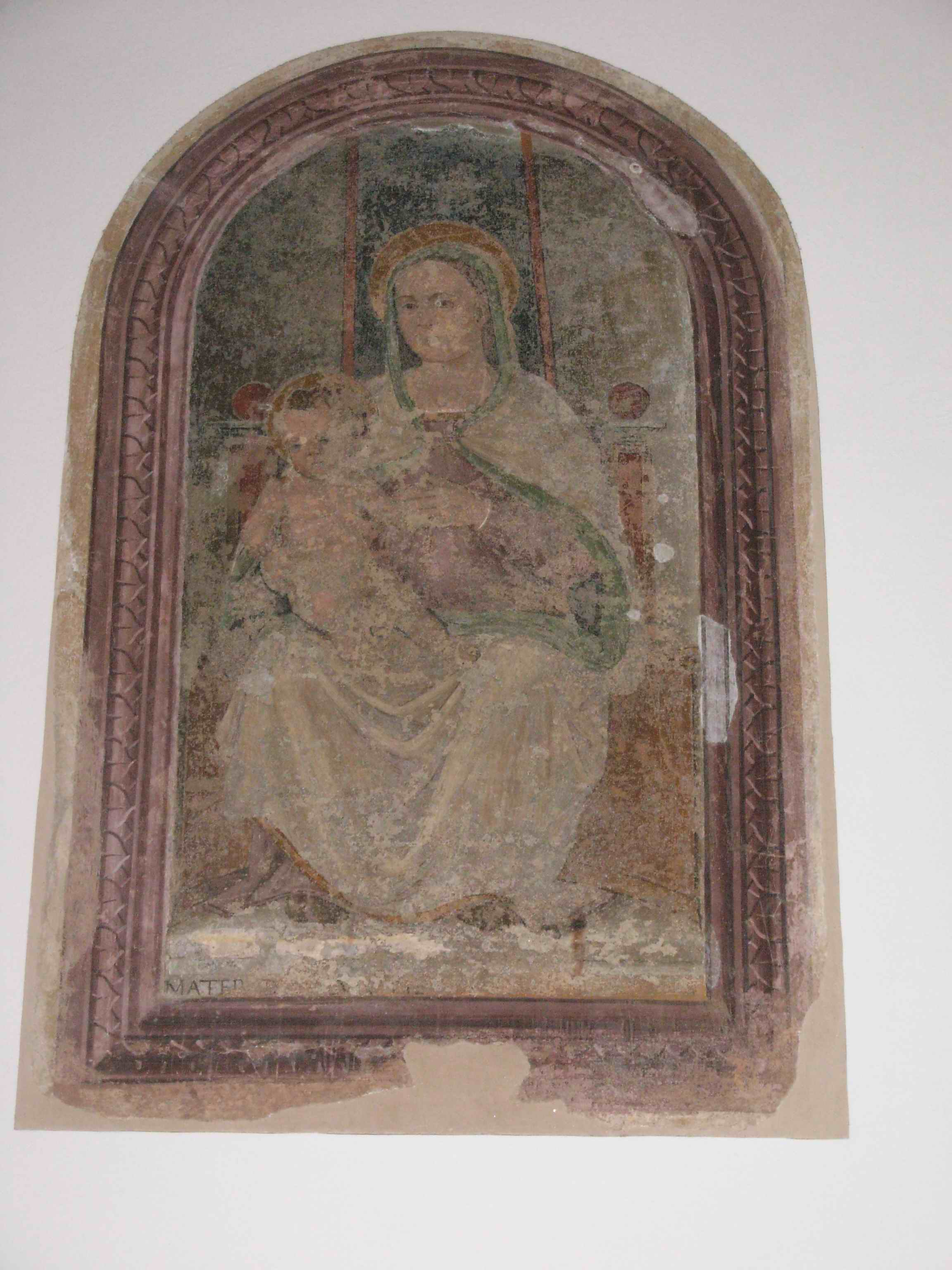 Giovanni Maria Tolosani, Madonna col Bambino, nella chiesa di San Niccolò a Roccastrada (GR, Italia)